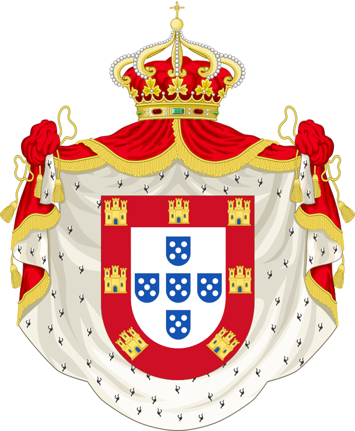 Brasão do Reino de Portugal